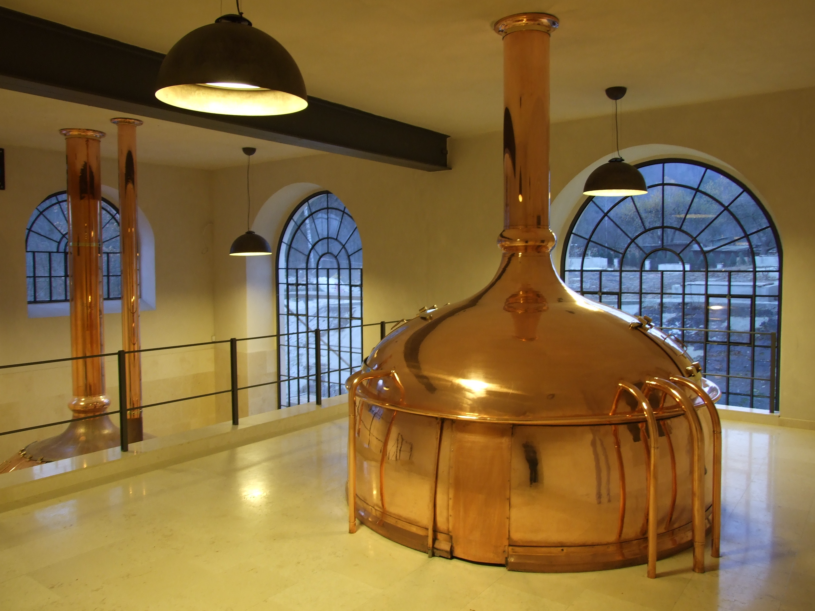 Dvounádobová měděná varna o kapacitě 50 hl